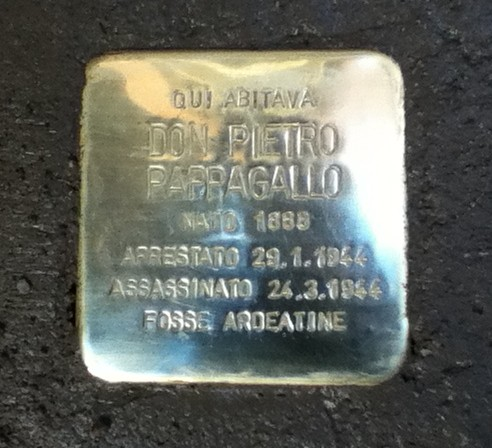 Stolpersteine per don Pietro Pappagallo davanti alla sua casa in via Urbana 2. Parte del progetto Memorie d'inciampo a Roma dell'artista Gunter Demnig